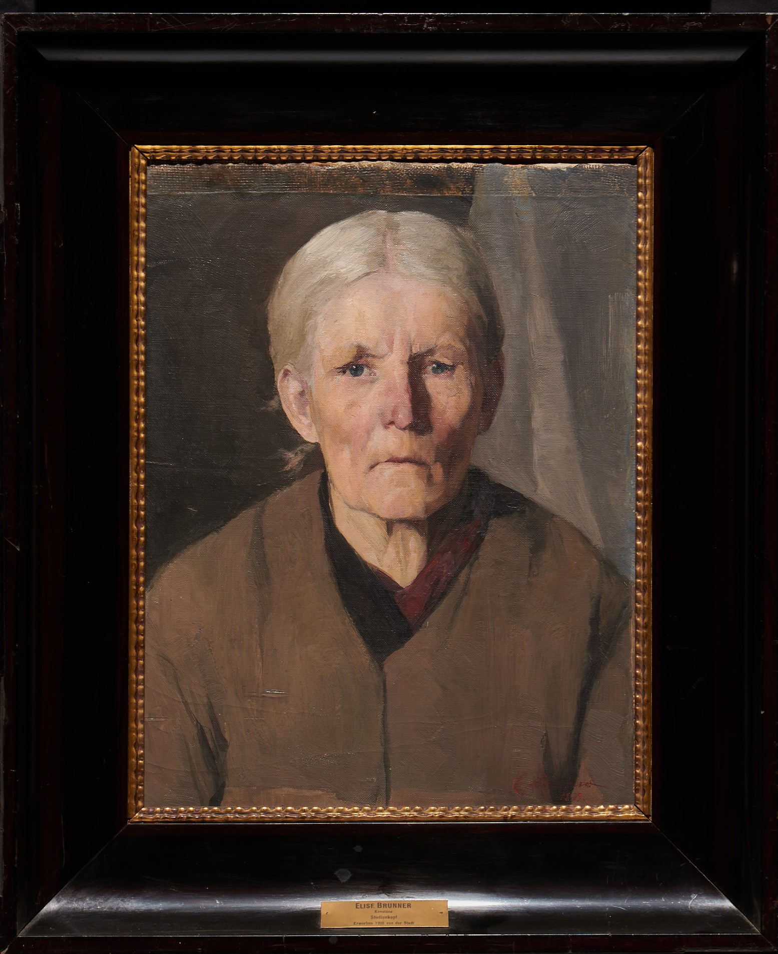 Elise Brunner: o. T. (En face Brustbild einer alten Frau), 1889; Öl auf Leinwand, 53 × 41 cm; Städtische Wessenberg-Galerie Konstanz.